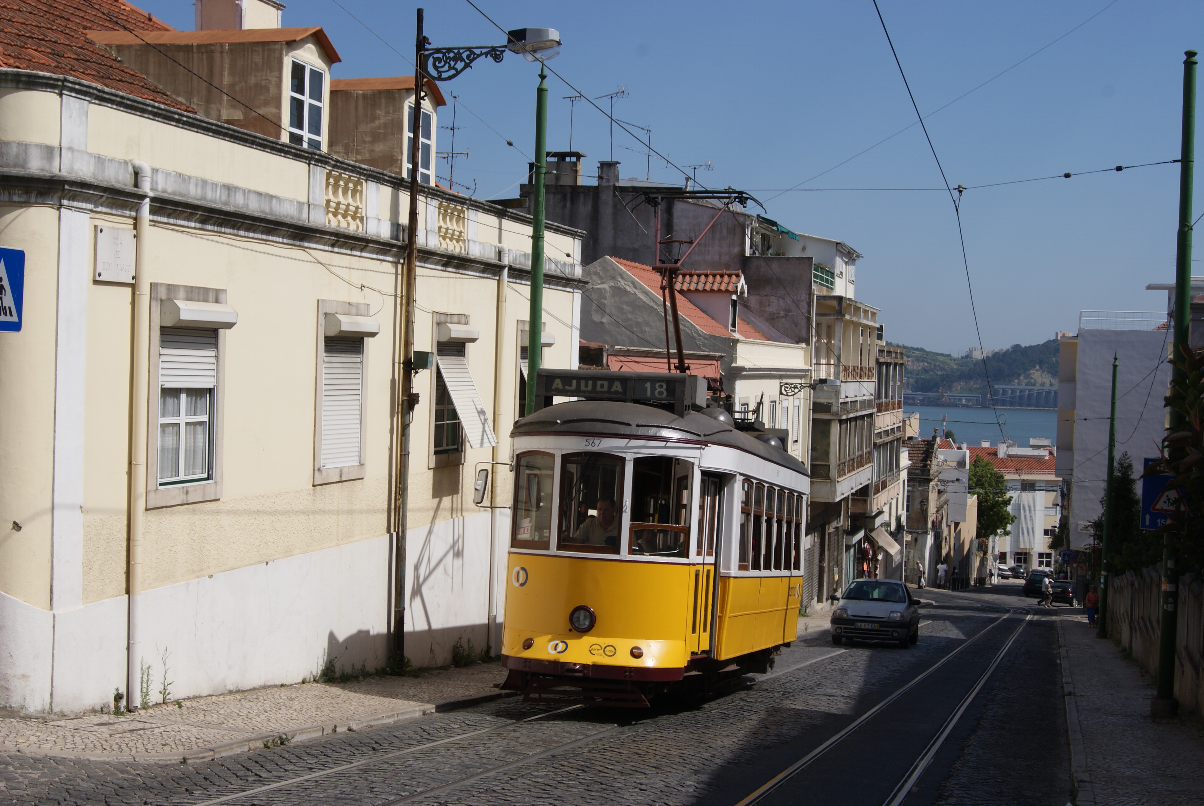 Photo: Trams aux Fils. Ligne 18, direction AJUDA Rua De Dom Vasco Tram 567 ancien tram 281 de la série 203-282